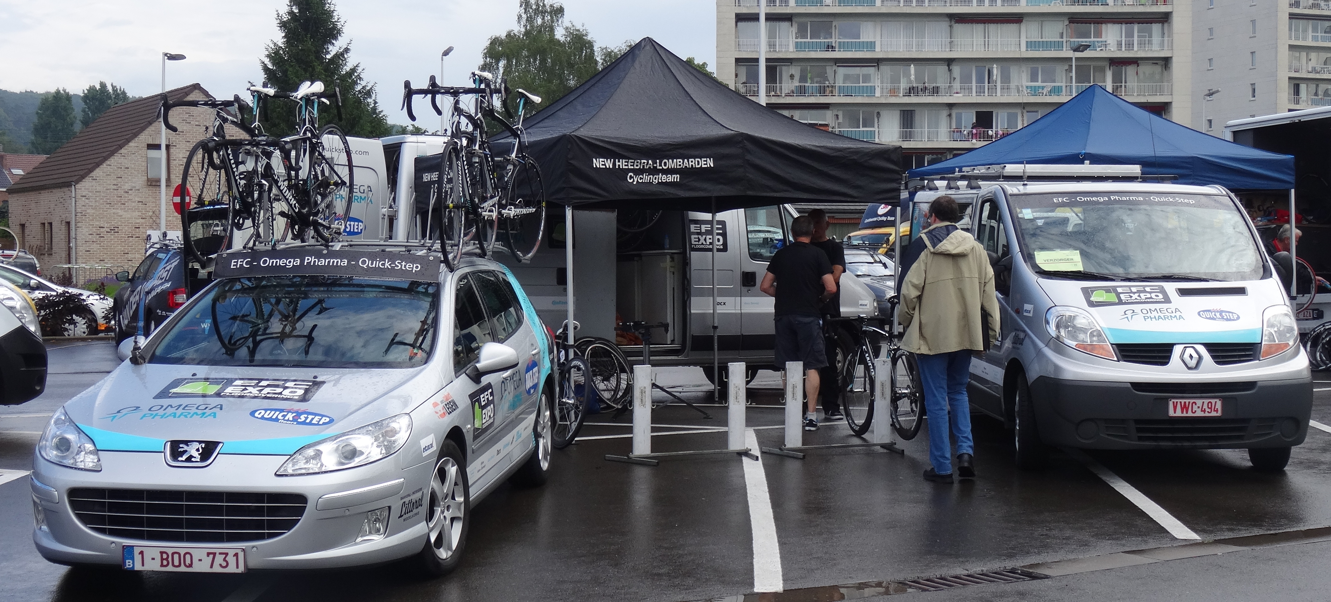 Reportage photographique réalisé le dimanche 8 juin à l'occasion du départ du Mémorial Philippe Van Coningsloo 2014 à Wavre, Belgique.